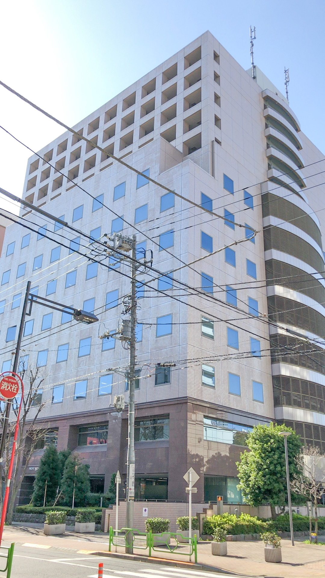 NTT DATA INTELLILINK Corporation HQ, Tsukishima, Chūō, Tokyo, Japan